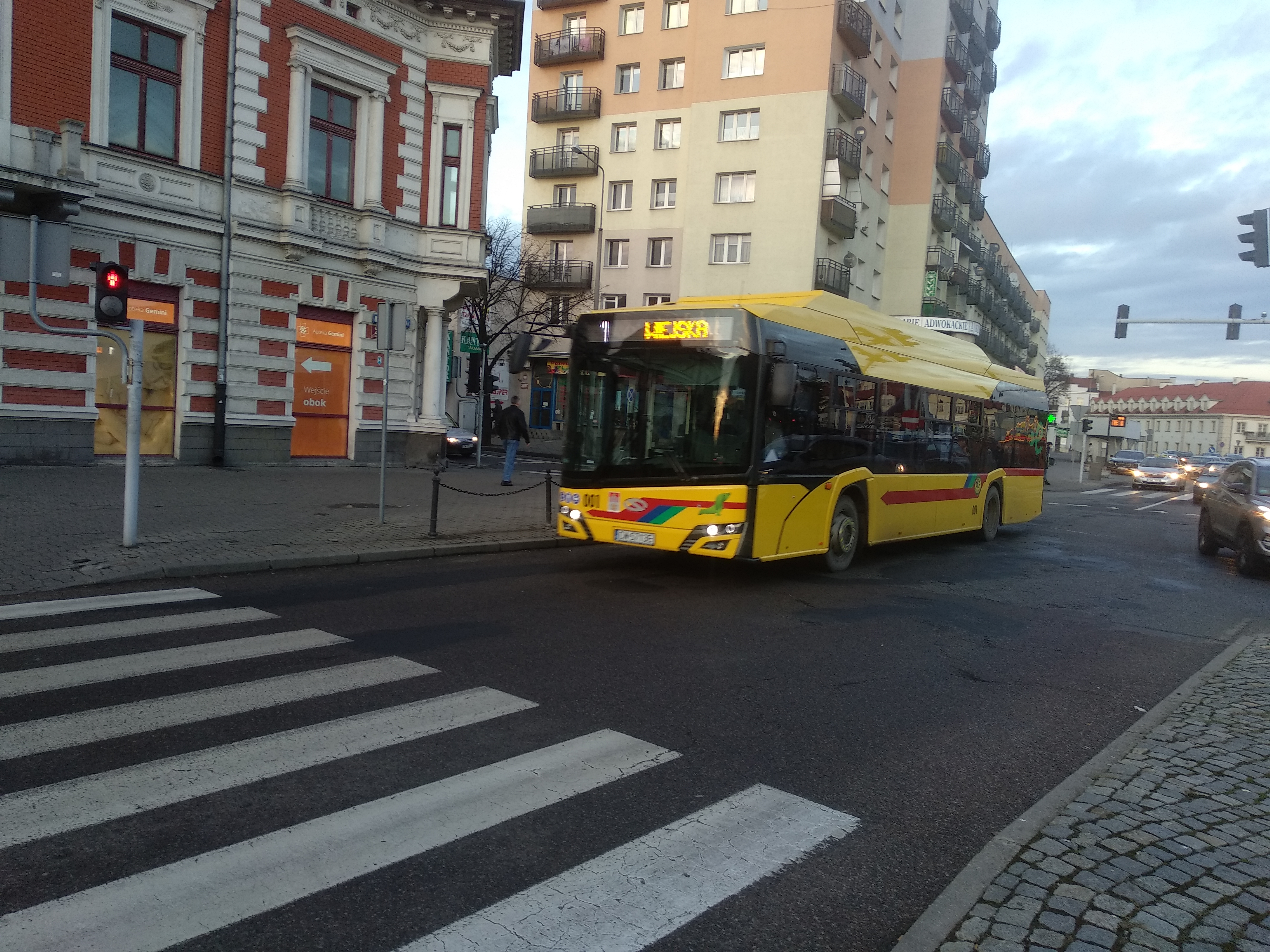 Urbino 12 electric w barwach włocławskiego MPK (2019 r.)